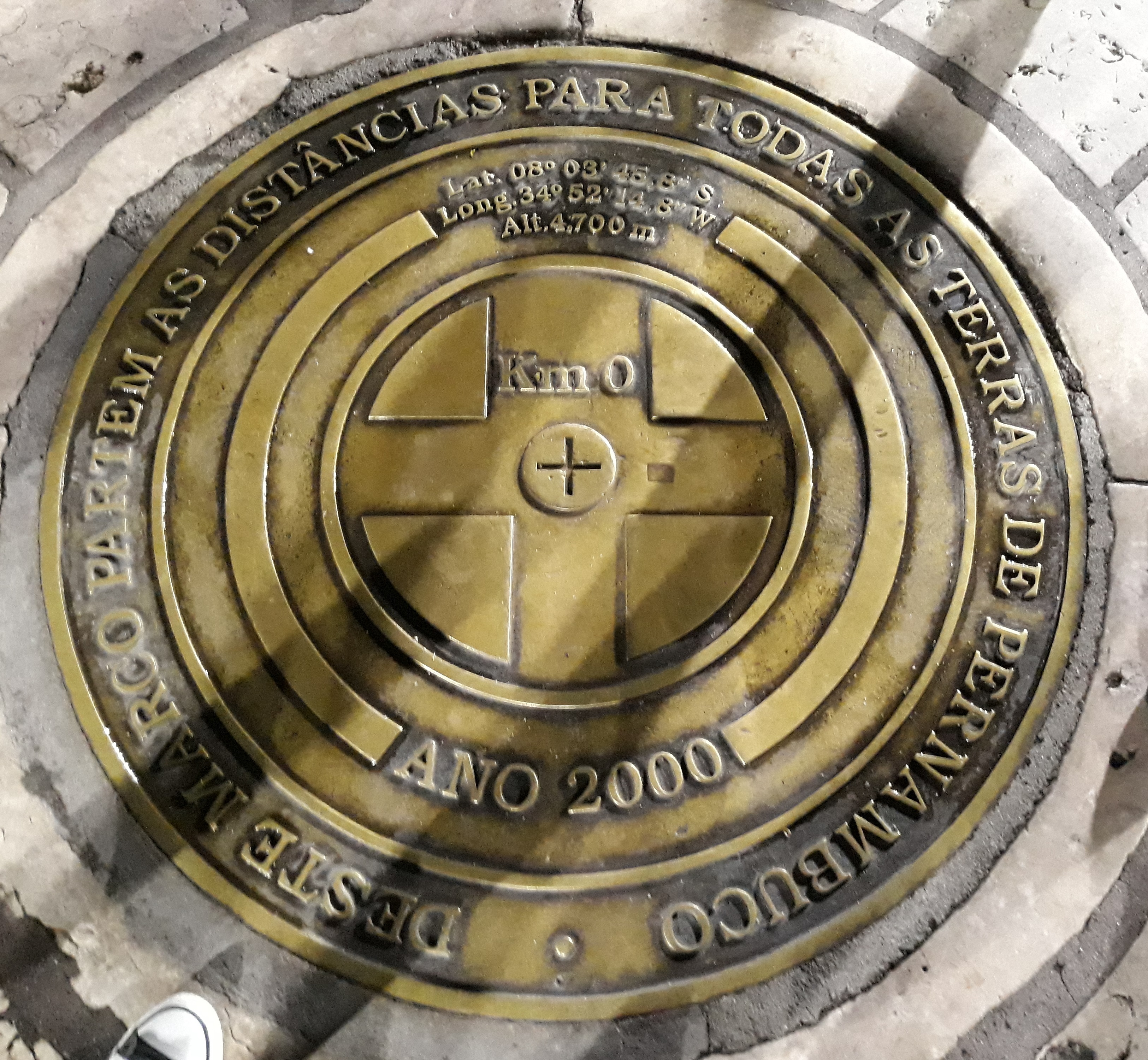 Marco Zero do Recife na Praça Rio Branco, onde são contadas todas as distâncias rodoviárias para todas as terras de Pernambuco, Brasil